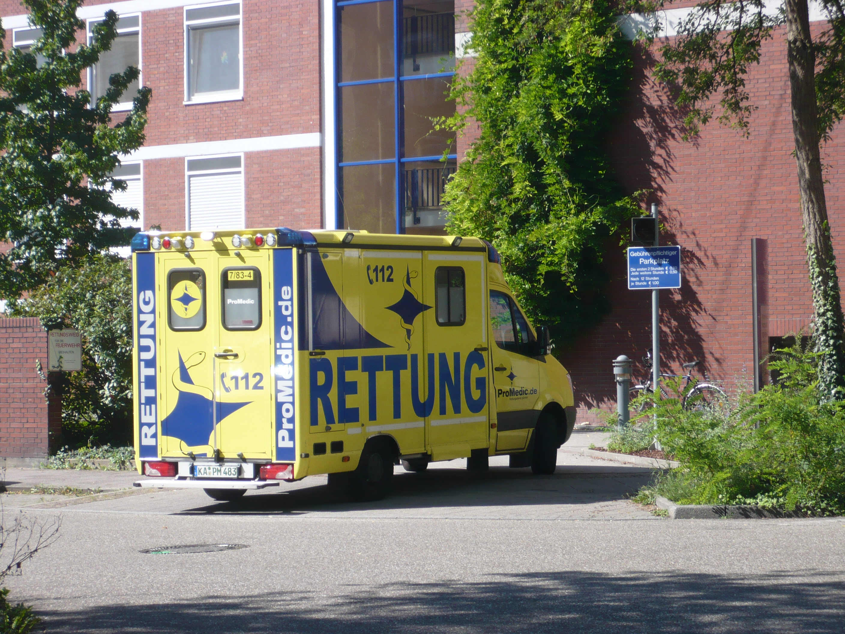 Rettungswagen der ProMedic Rettungsdienst gGmbH Karlsruhe auf Mercedes Sprinter Basis. Kofferaufbau der Firma System Strobel